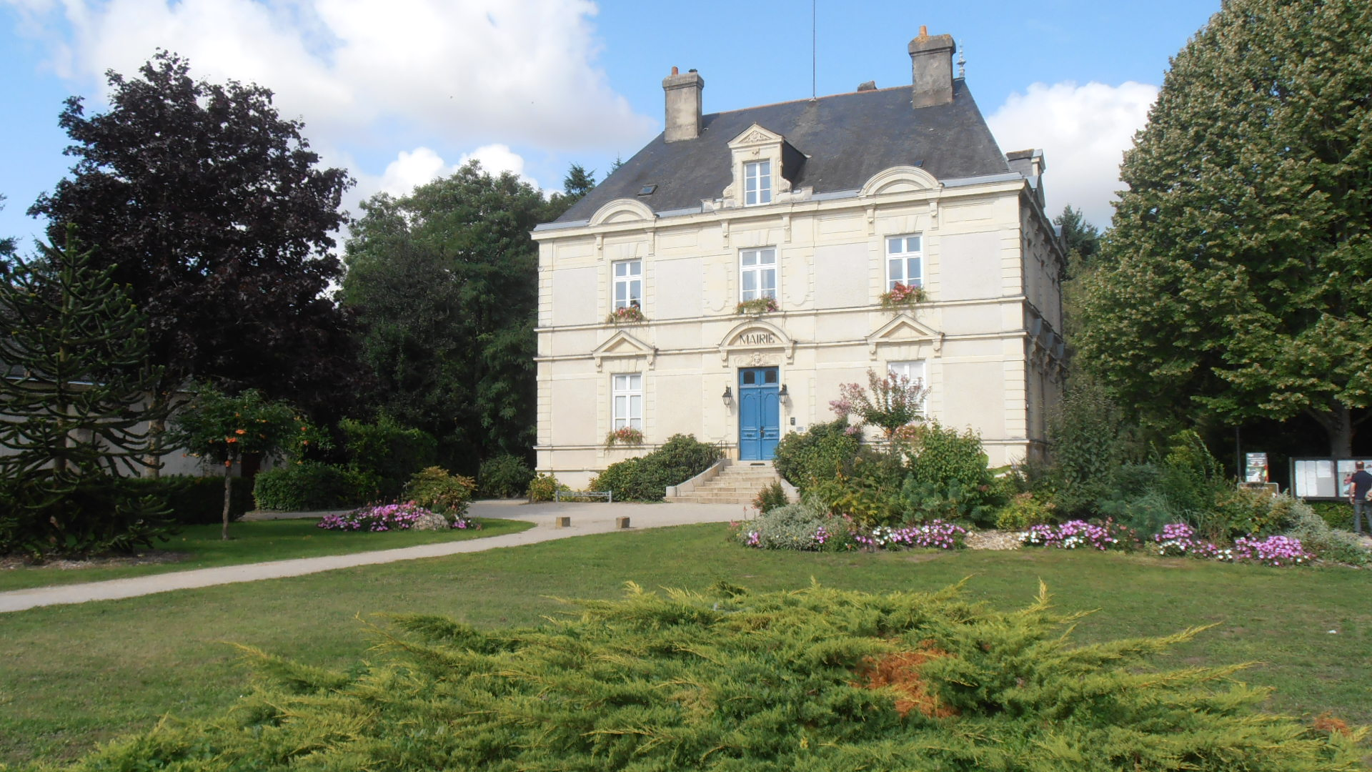 La mairie du Plessis-Grammoire (Maine-et-Loire, France).